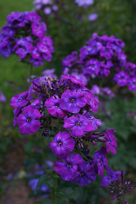 Флокс метельчатый 'Тайна'